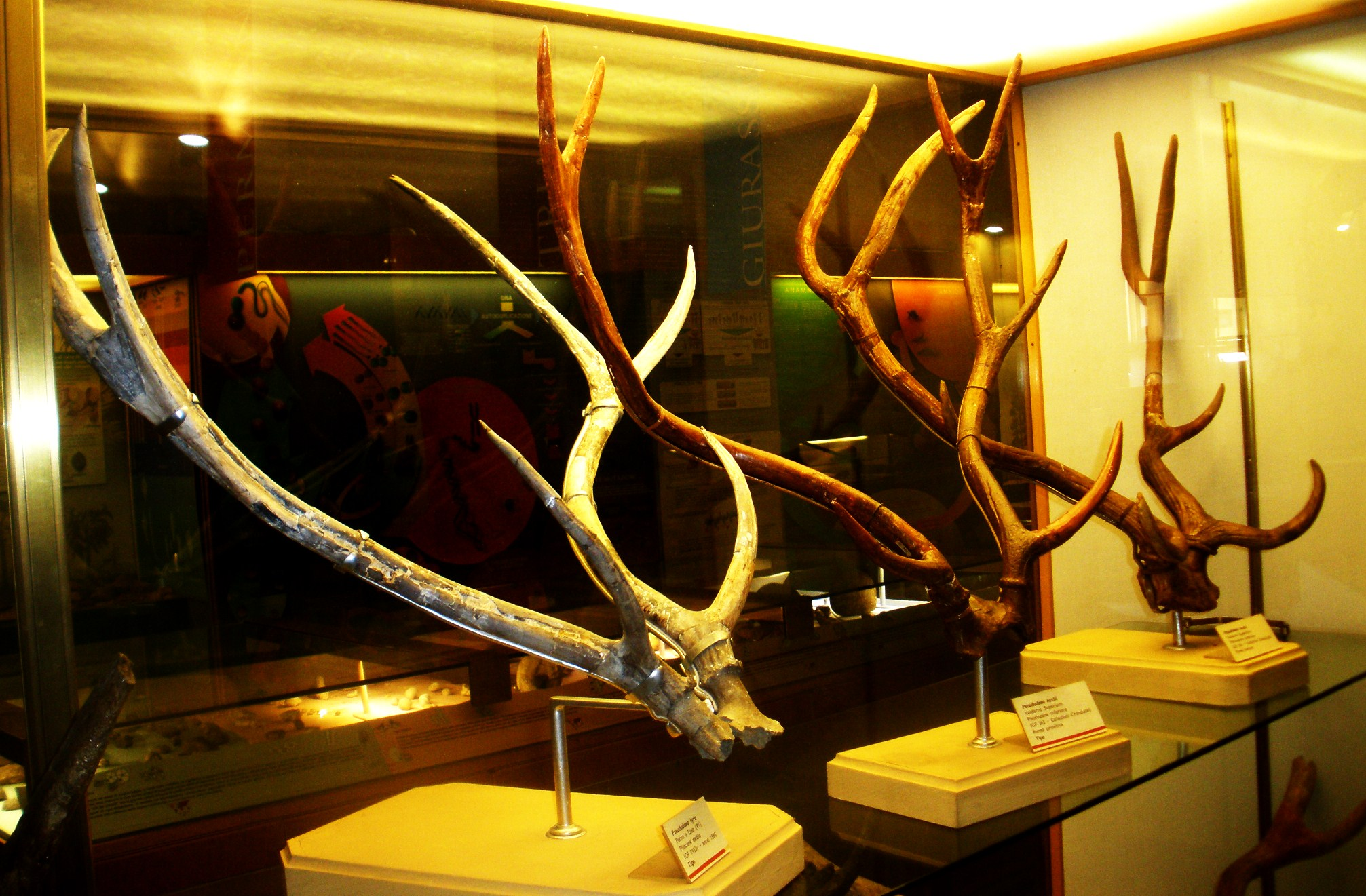 Fossil of Pseudodama, an extinct mammal -- Topok the picture at Museo di Paleontologia di Firenze